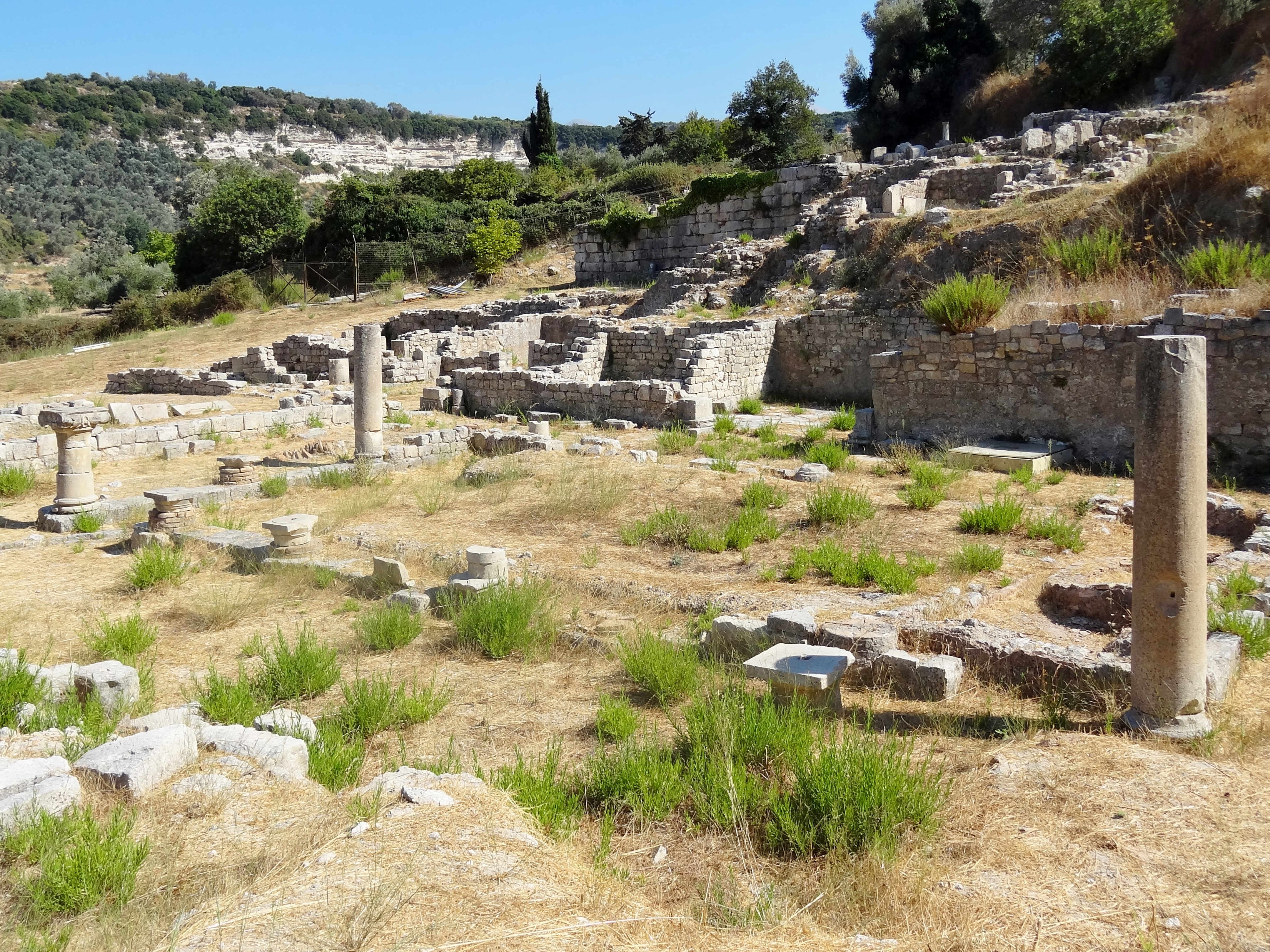 Ausgrabungsstätte von Eleutherna (Ἐλευθέρνα), Gemeinde Rethymno, Regionalbezirk Rethymno, Kreta, Griechenland